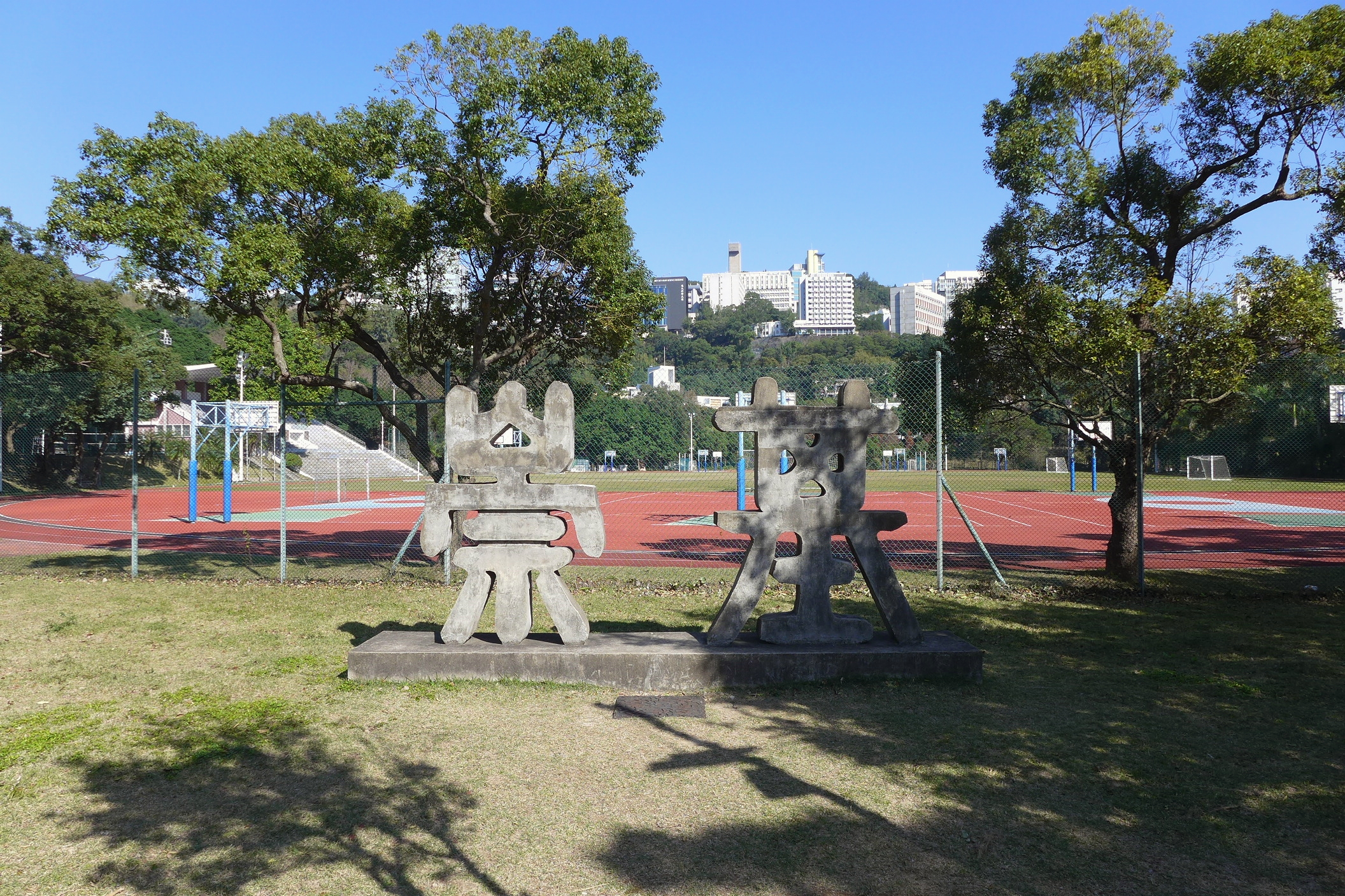 Chung Chi Signature